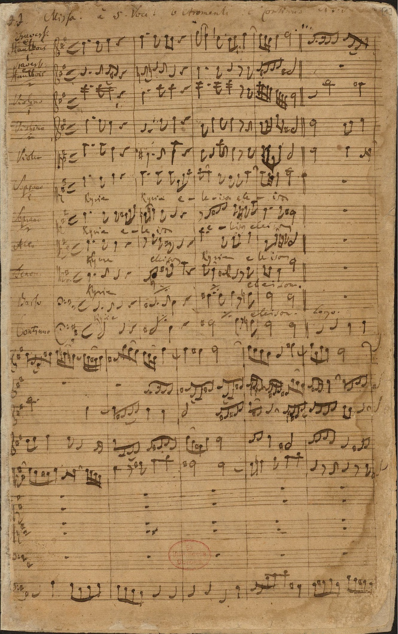 Johann Sebastian Bach, Messe in h-Moll BWV 232, Autograph der ersten Seite des Kyrie